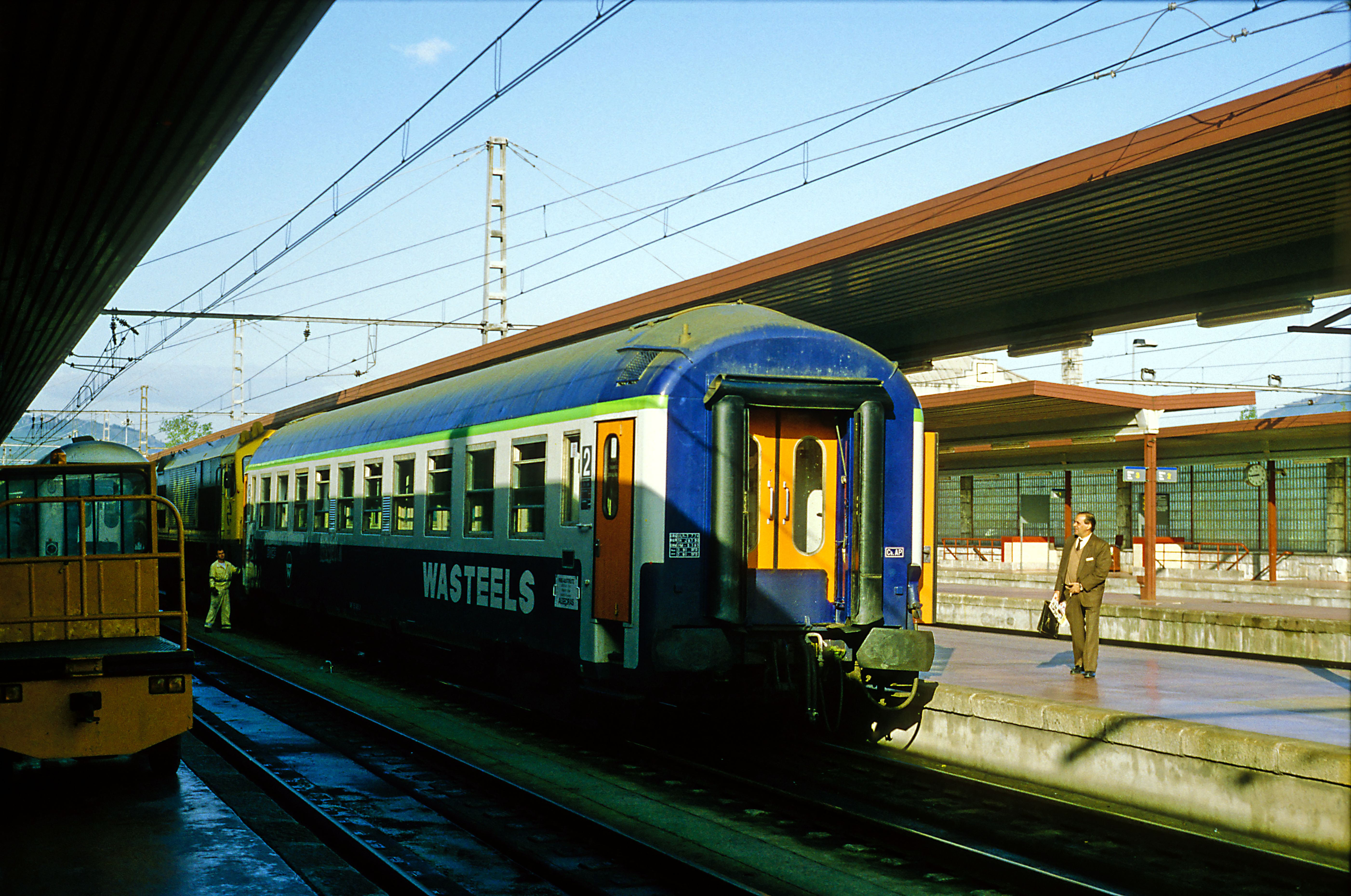 Während der Wartezeit nach dem Umspuren in Hendaye auf die Bereitstellung des Estrella »Media Luna« nach Algeciras. Der Kurswagen benötigte einschließlich einer Ehrenrunde über Pamplona für die Gesamtstrecke 34 Stunden, die SNCF setzte für diesen Wagenlauf bis zum Schluss nur ältere Wagen ein (um die es nicht schade war).